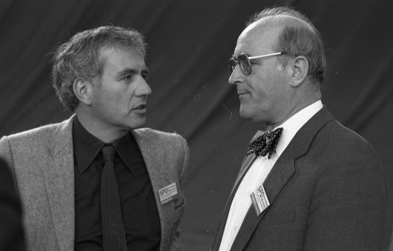 SPD-Parteitag in der Olympiahalle in München 19.-23.04.82